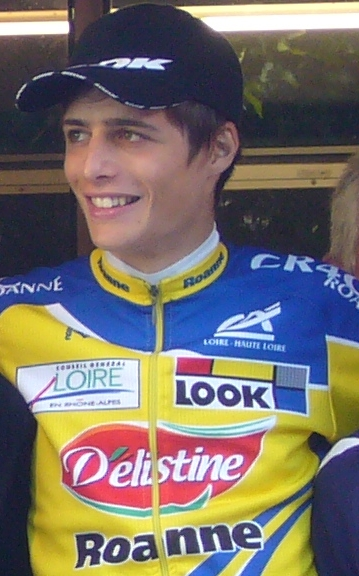 Le coureur cycliste français Arthur Vichot (C4 chemins de Roanne) lors du Tour du Gévaudan 2008. Photo prise à Mende en septembre 2008.